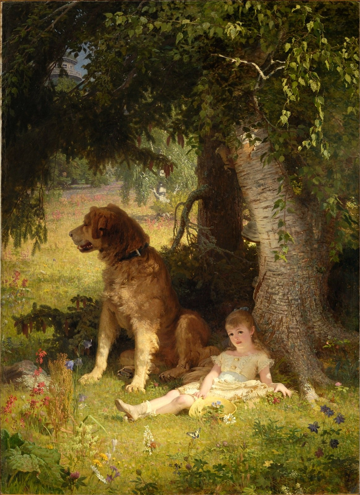 Muuseumikogu Maalikogu Autor Köler, Johann Olemus maal Kunstiese Säilivus rahuldav